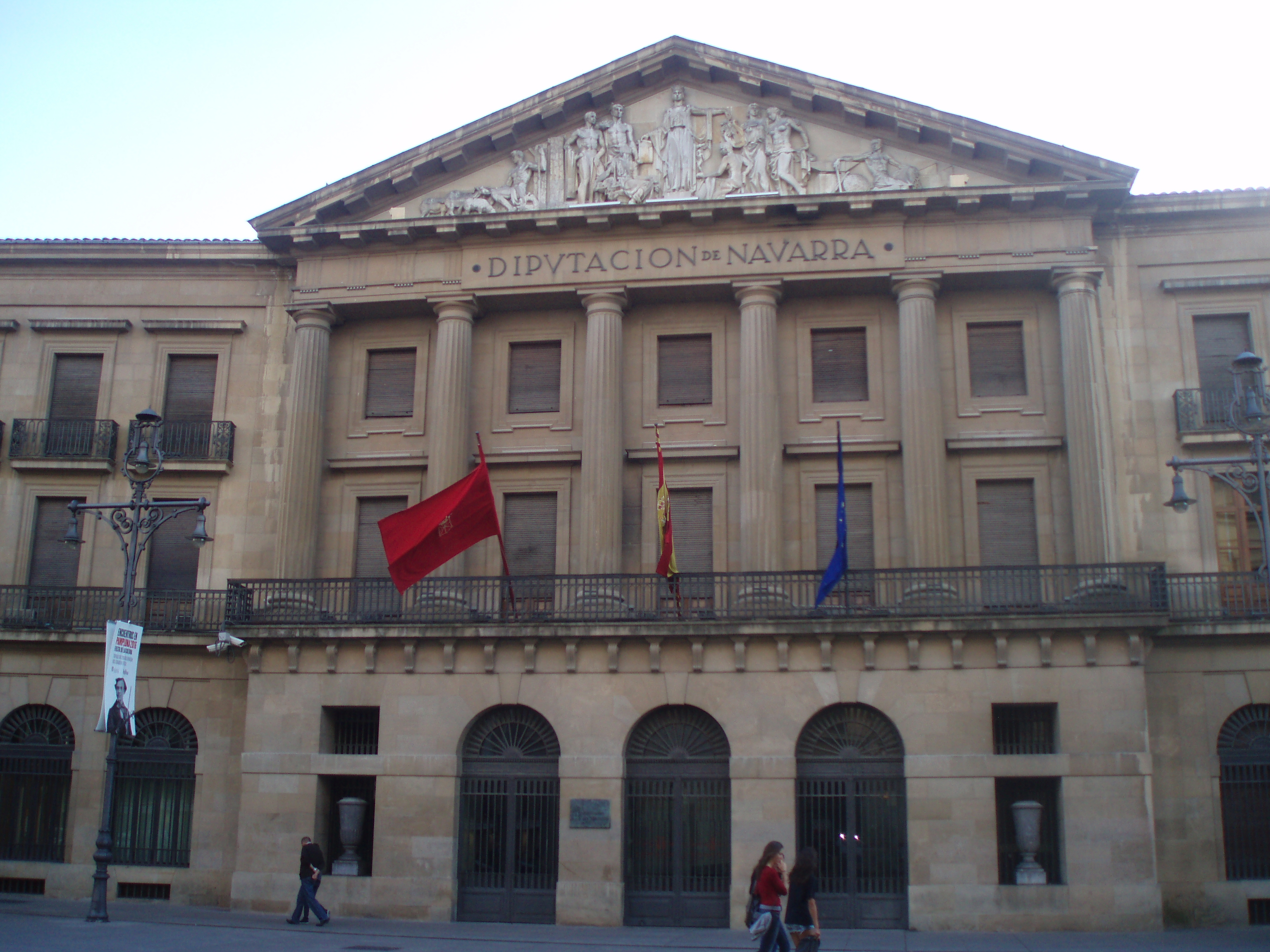 Cuerpo central de la fachada principal del Palacio de Navarra. Navarra, (España).